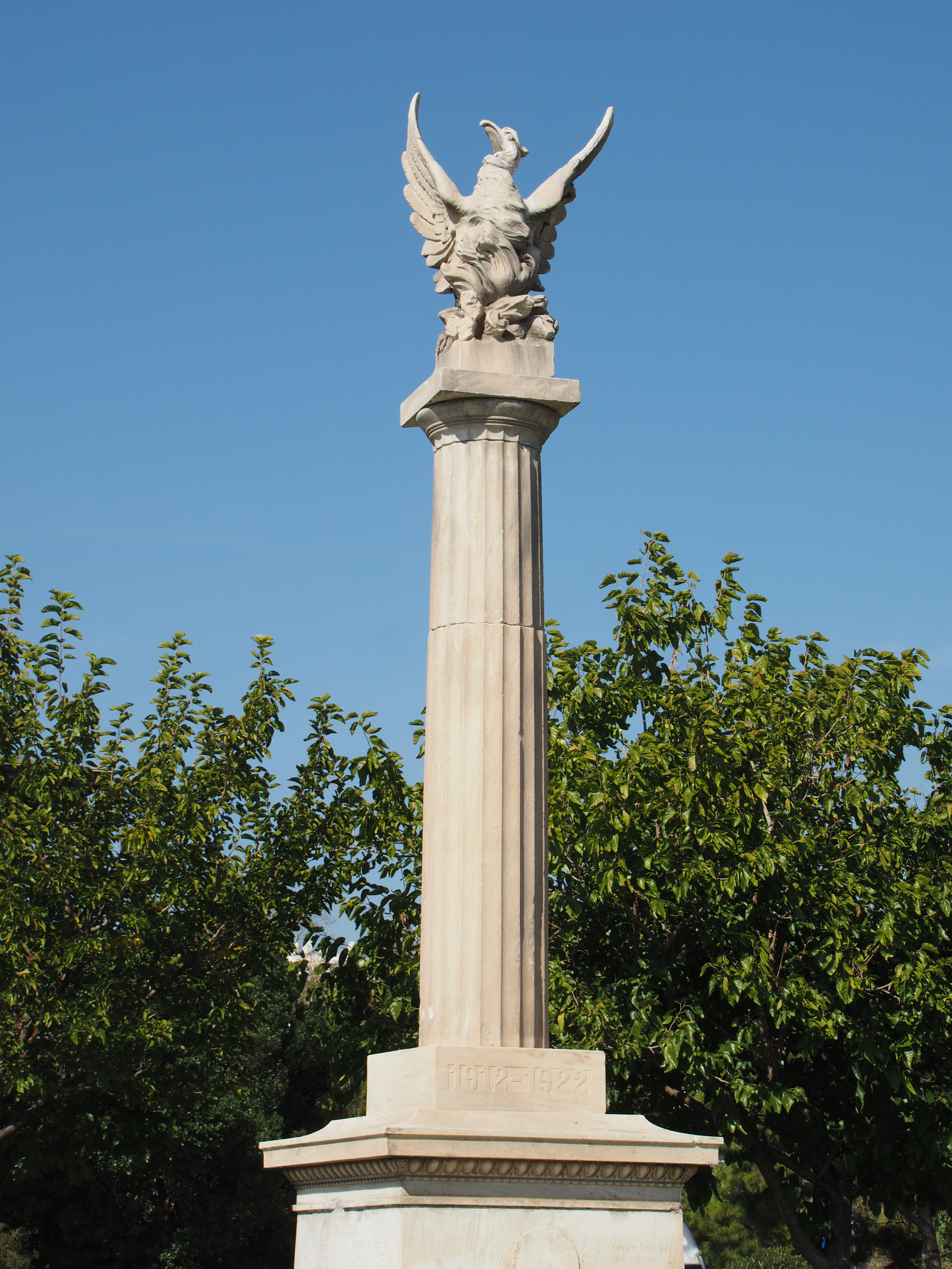 Volos, Denkmal Griechisch-Türkischer Krieg 1919–1922